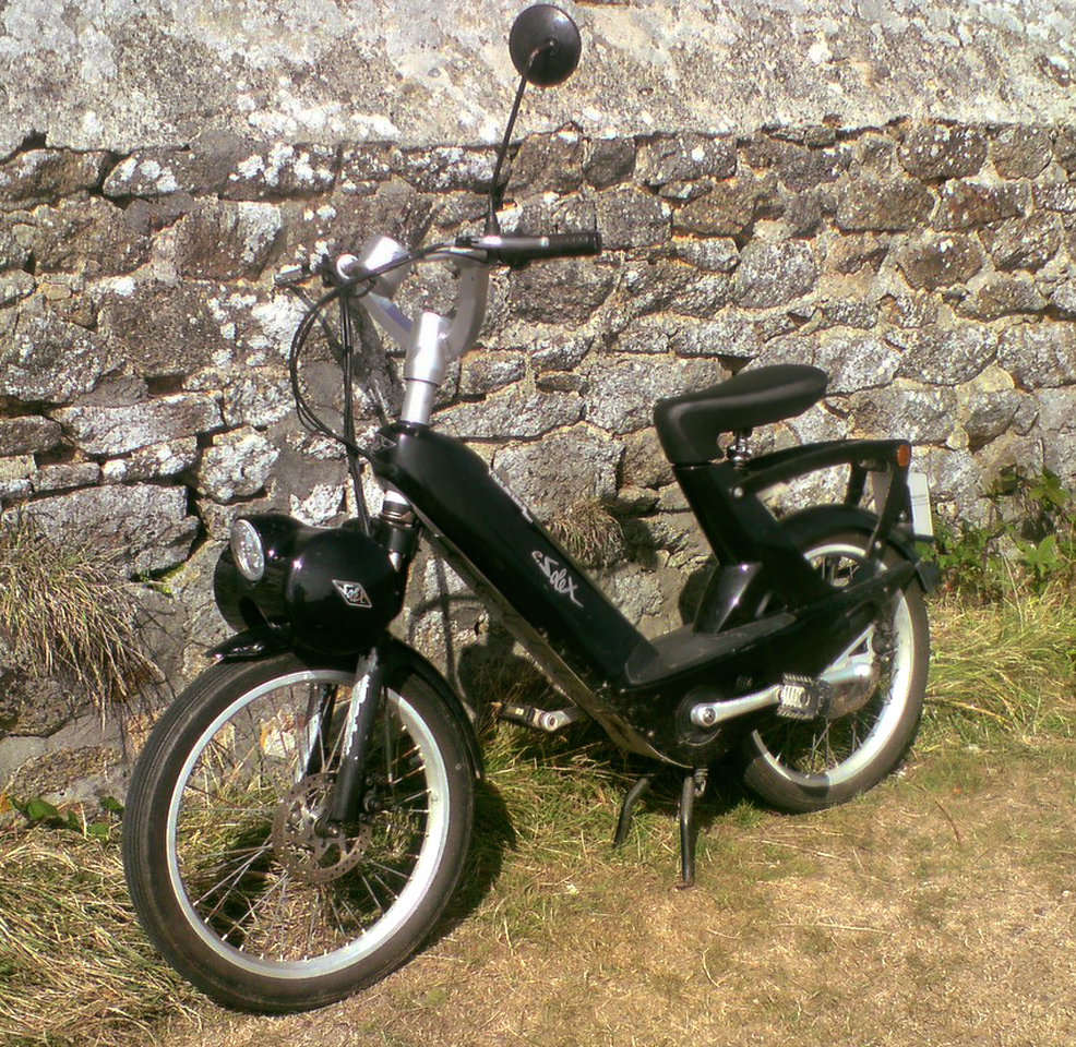 Un e-Solex en Bretagne.